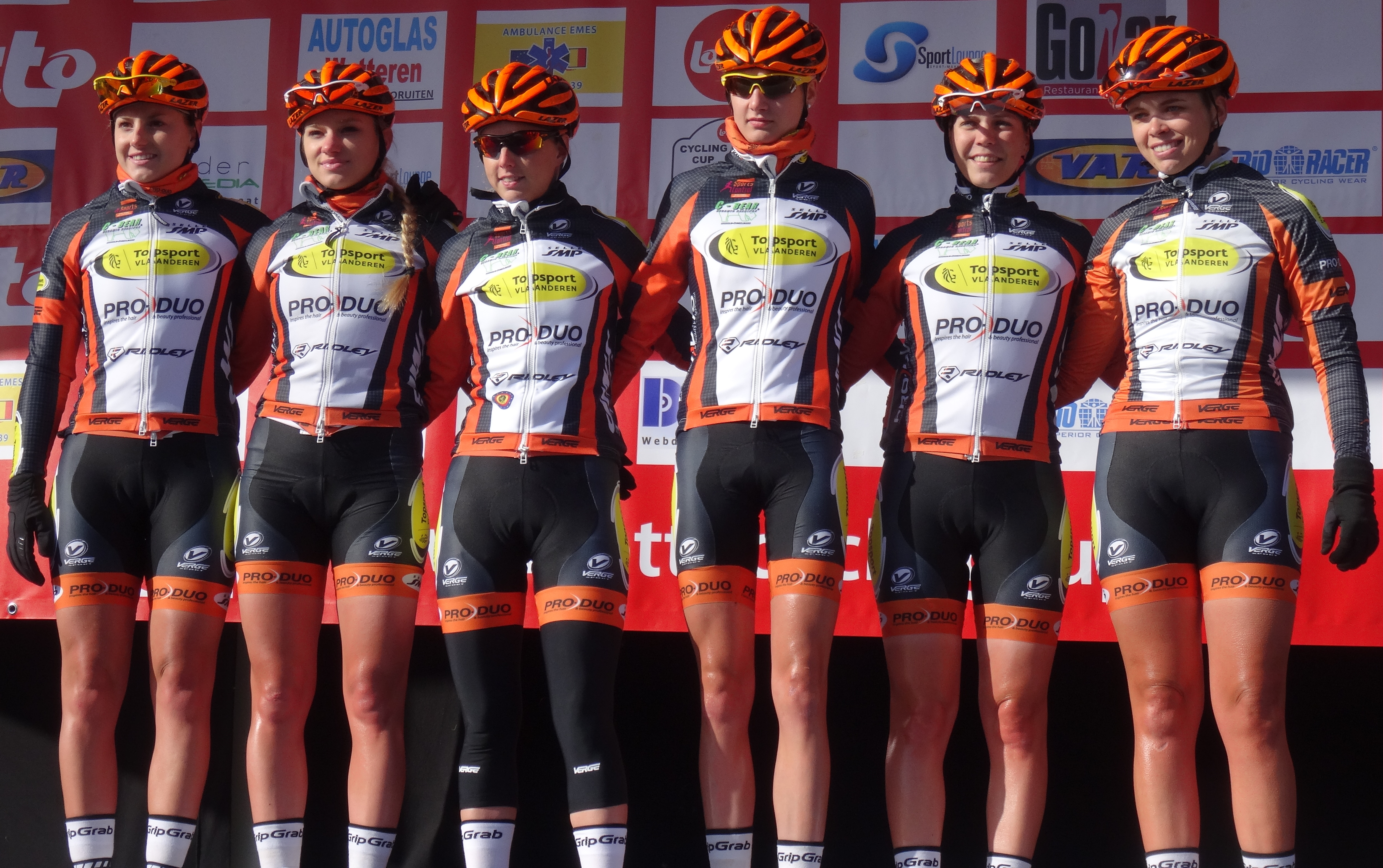 Reportage réalisé le mercredi 4 mars à l'occasion du départ du Samyn des Dames 2015 et du Samyn 2015 à Quaregnon, Belgique.